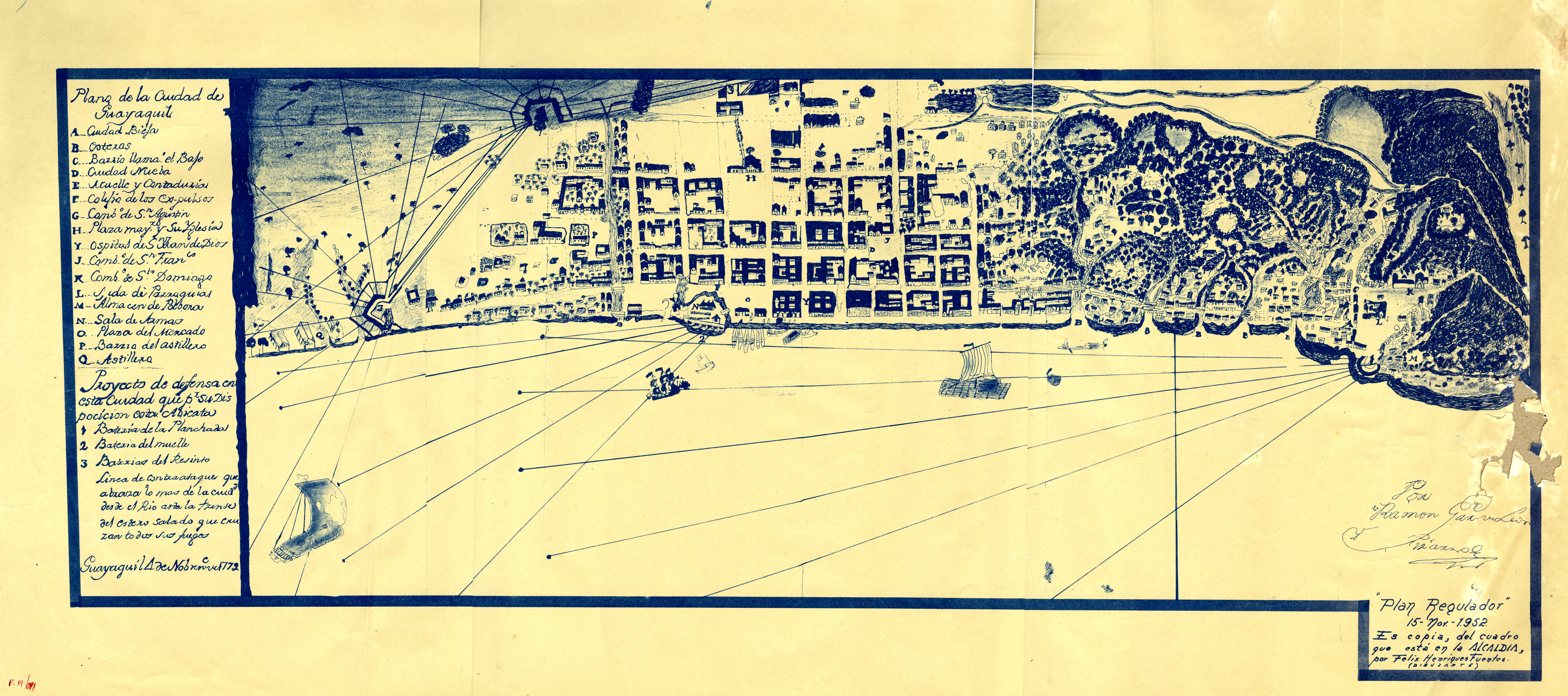 Plano oficial de la Ciudad de Santiago de Guayaquil fechado a 4 de Noviembre de 1772. Atribuido según consta a la autoría del Gobernador Ramón García de León y Pizarro. Se ilustra la aparición consolidada de Ciudad Nueva y Ciudad Vieja, las fortificaciones, el puerto, la organización del Vecindario, los edificios públicos y religiosos como también los cerros y esteros desde su ubicación urbana inicial del emplazamiento. Diapositiva de Consulta y acceso público cuya información fue investigada de un facsímil y/o ejemplar de revisión custodiado en los Fondos de Mapoteca (Sección Siglo XVIII o Etapa Colonial, Historia de Guayaquil) del Archivo Histórico de Guayas; Guayaquil, Ecuador.Consultado y compartido por el usuario J. Javier García A.